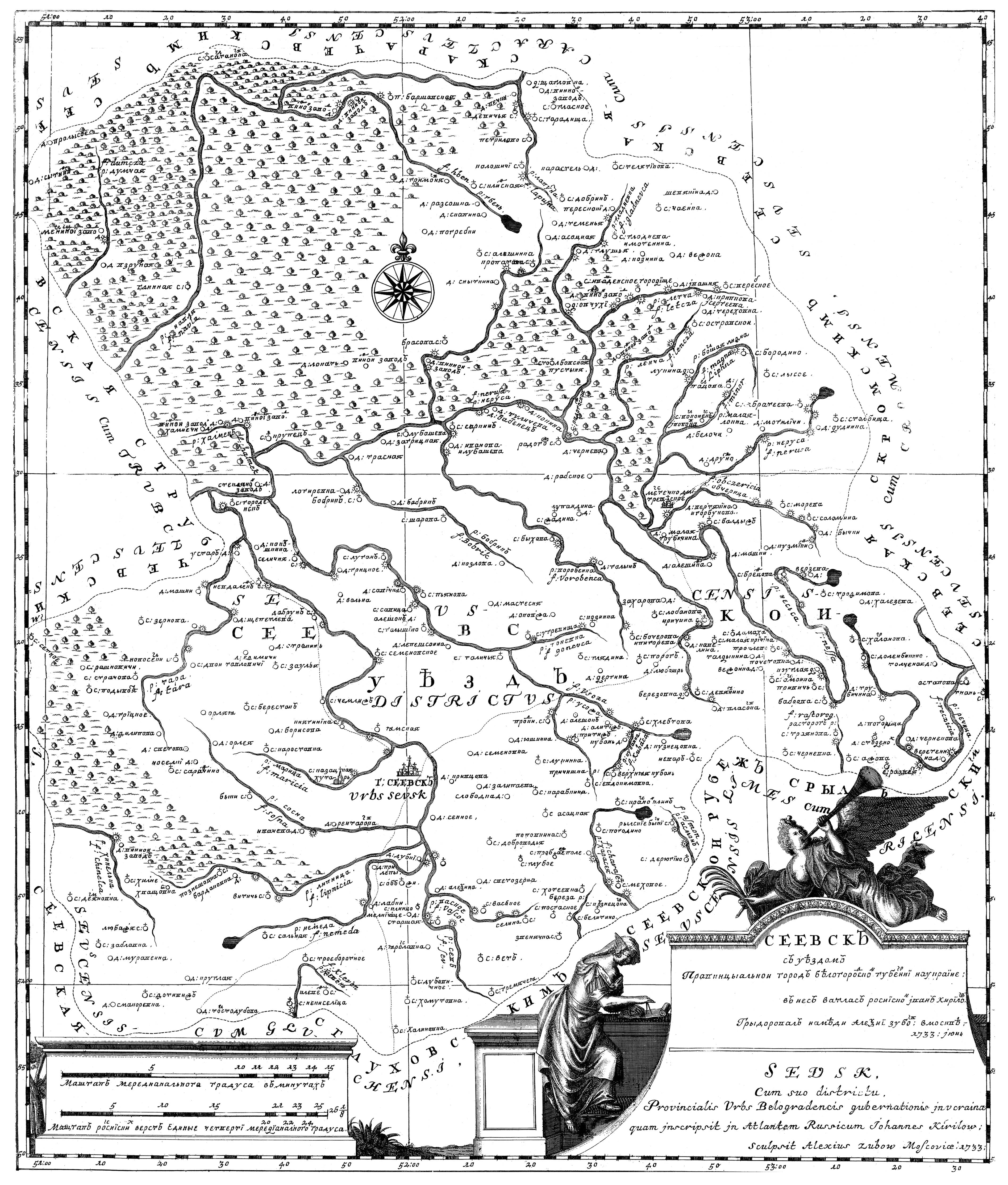 Севский уезд. «Атлас Всероссийской империи» И. К. Кириллова. 1722-1737 гг.